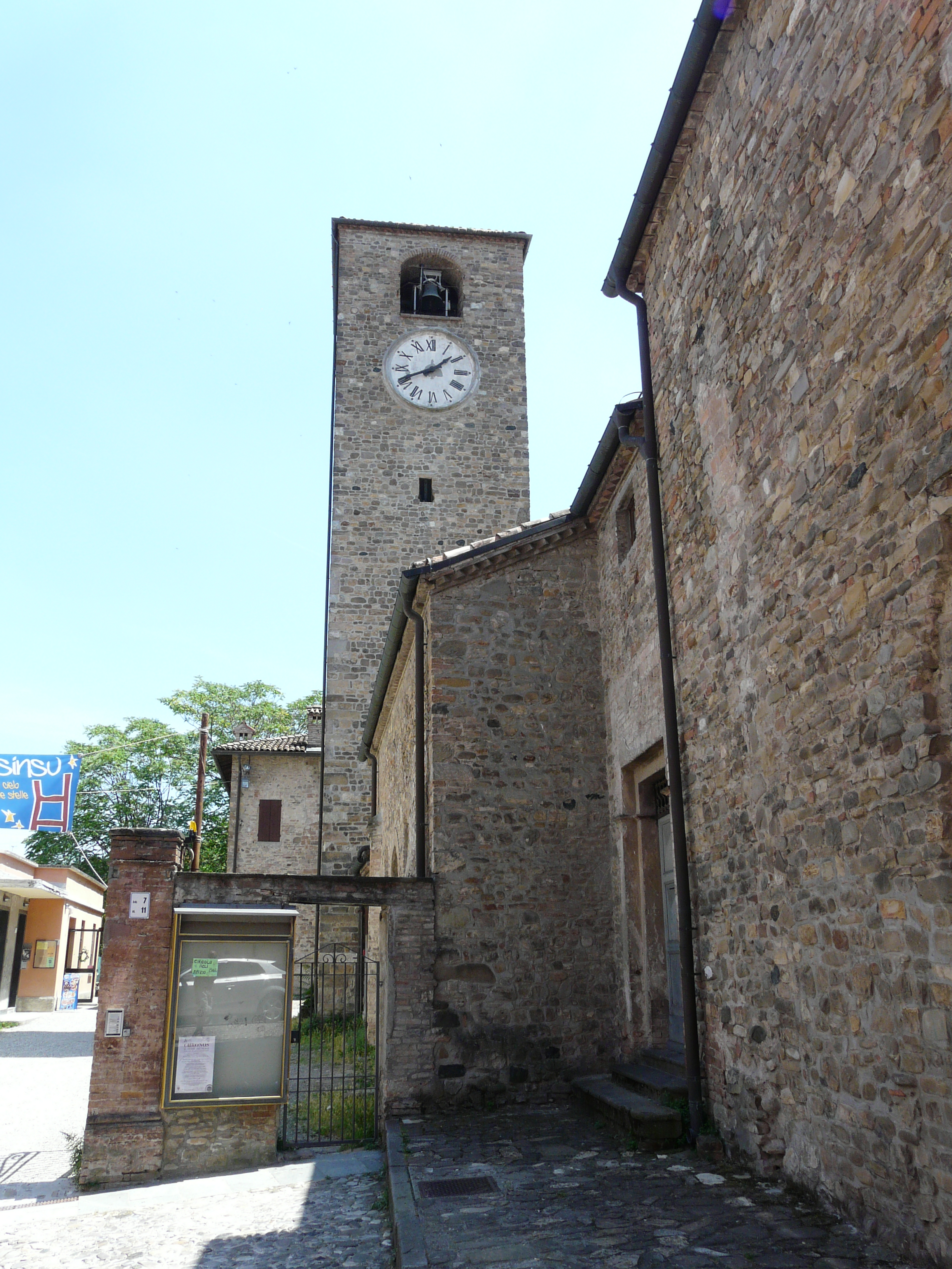 Chiesa dell'Assunzione di Maria Vergine, Fornovo di Taro, Emilia-Romagna, Italia